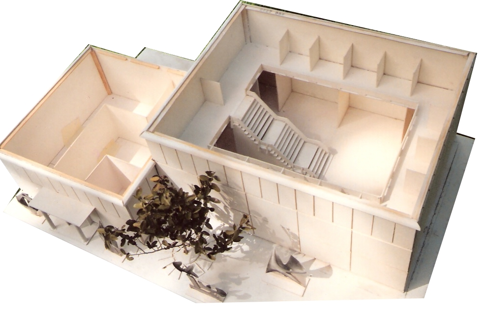 Museum Modell 2